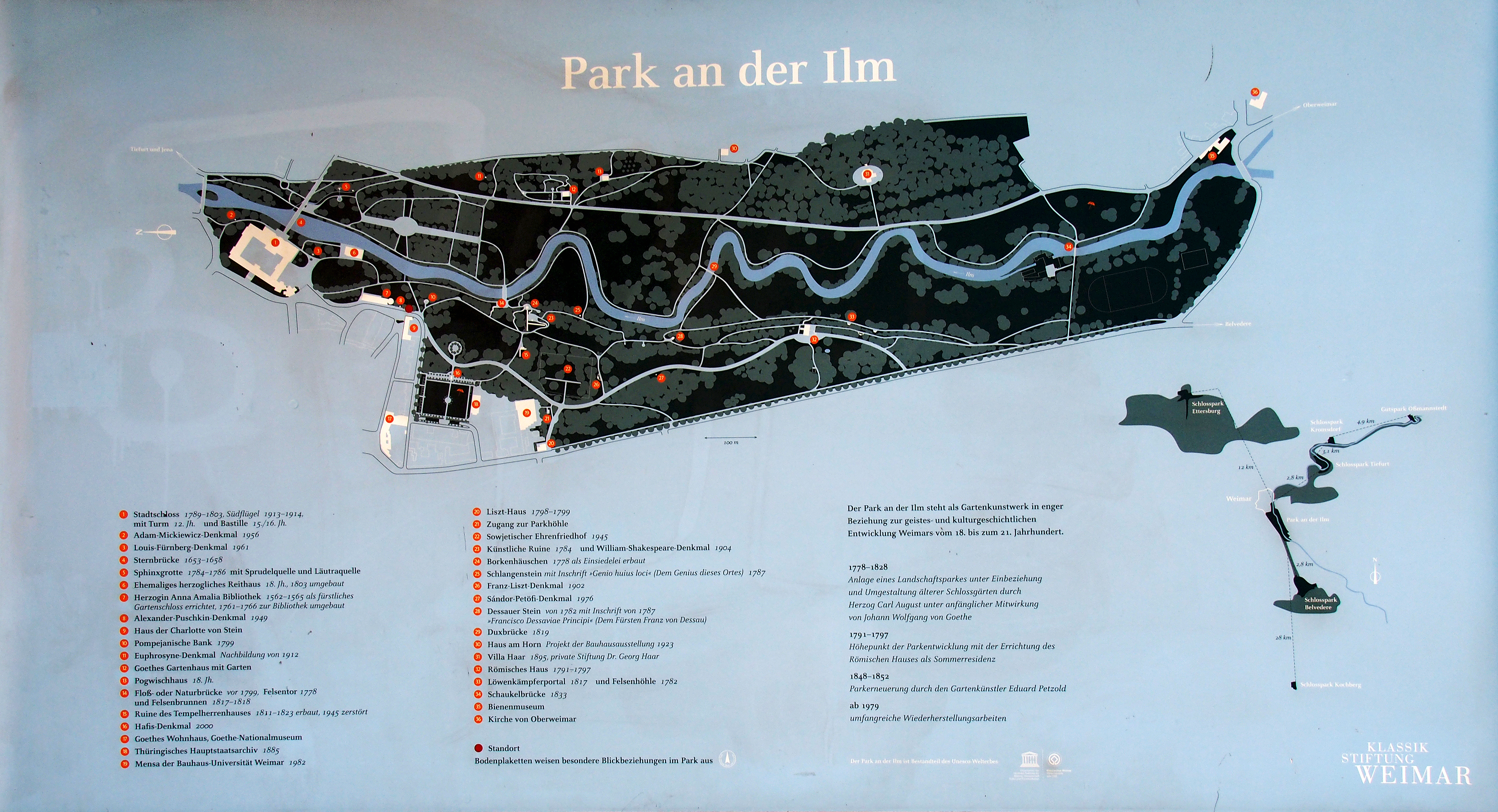 Plan des Parks an der Ilm (Weimar)